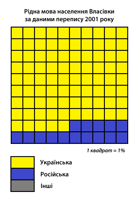 Інфографіка розподілу населення смт Власівка Світловодської міськради за рідною мовою згідно з даними перепису 2001 року. Джерело: Розподіл населення Кіровоградської області за рідною мовою (у % до загальної чисельності населення) за переписом 2001 року